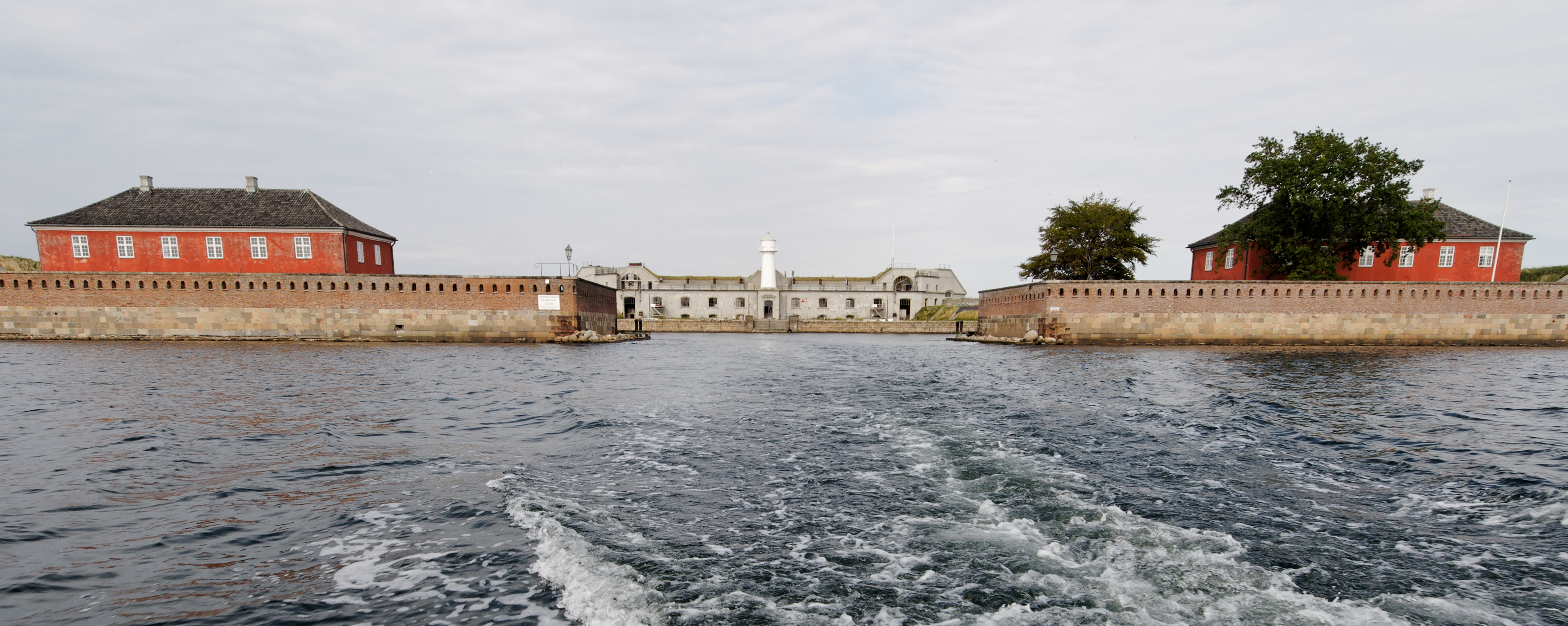 The Trekroner fortress off Copenhagen, Denmark